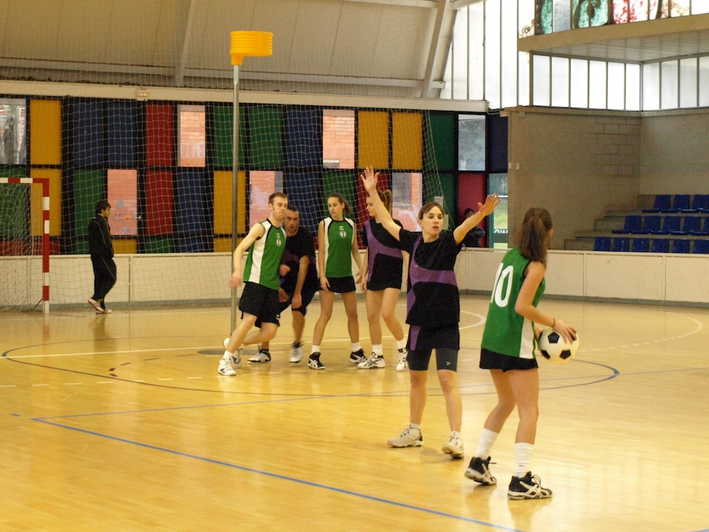 Imatge d'un partit de la Lliga Nacional entre el KC Barcelona i el CK Castellbisbal, de la temporada 2008-09, jugat a Sant Cugat.